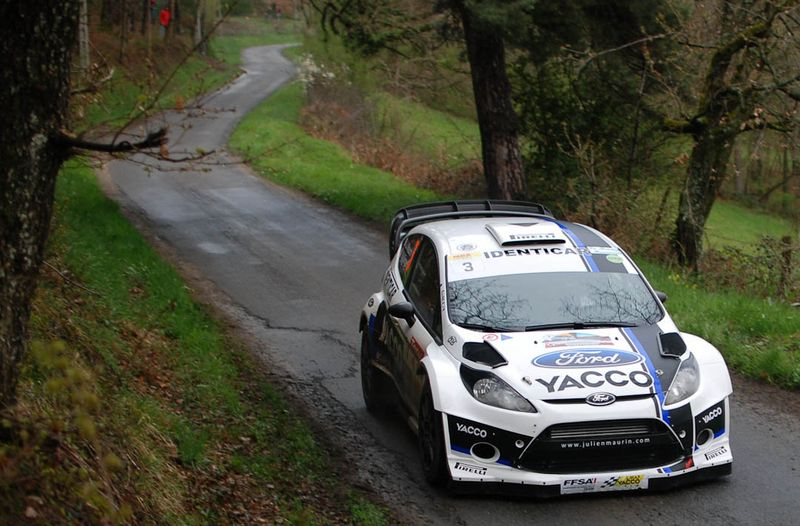 Julien Maurin - Nicolas KLINGER Rallye Lyon Charbonnière 2013 * Chamionnat de france des rallyes